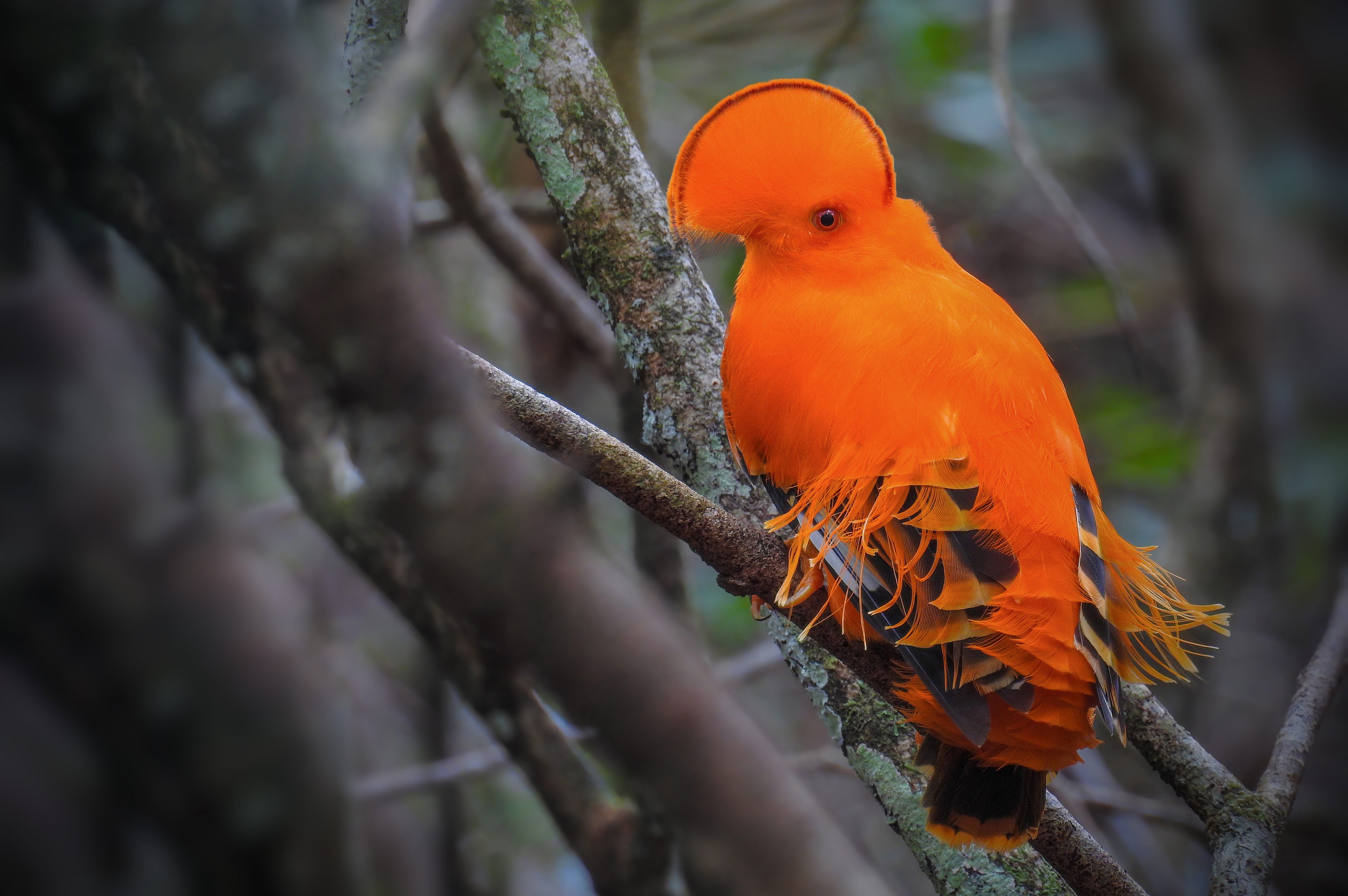 O Galo-da-serra (Rupicola rupicola), Linaeus 1766, é uma ave passeriforme da família Cotingidae.